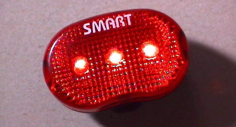 Rood fietslampje met LEDjes.